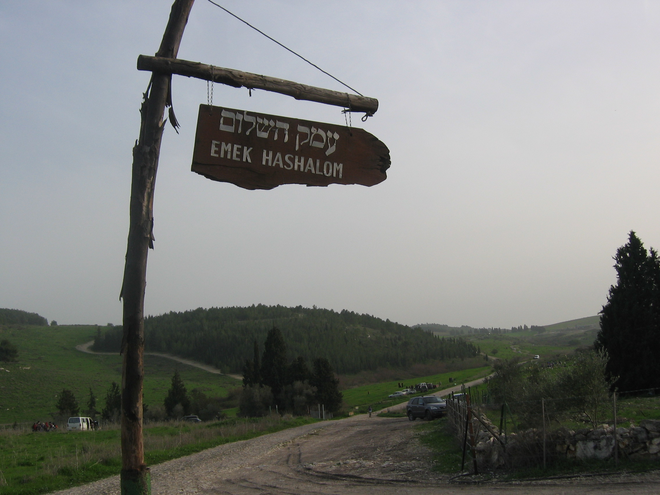 שלט לכיוון עמק השלום